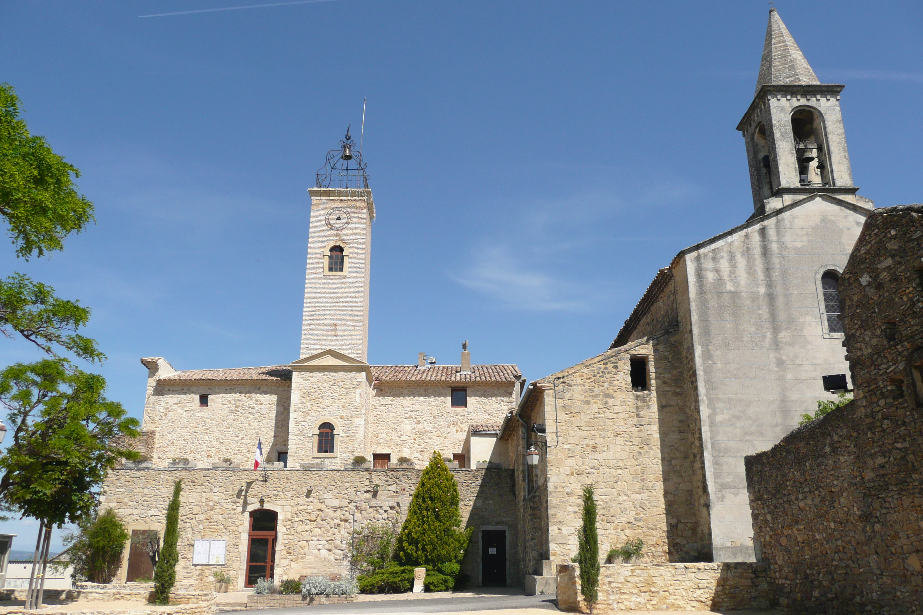 Eglise à Saint-Alexandre (Gard).